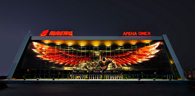 Изображение «Арены Омск»